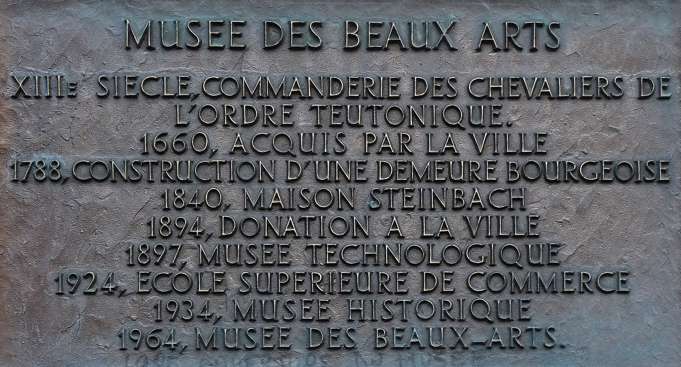 Musée des beaux-arts de Mulhouse, dans la Villa Steinbach : plaque retraçant la chronologie